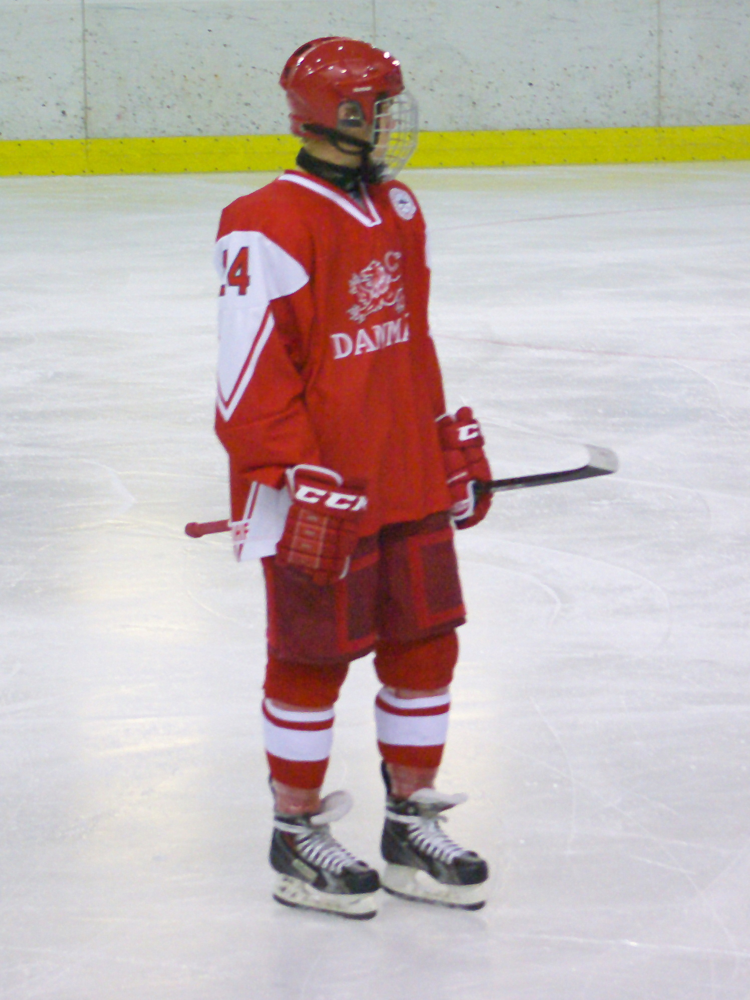 Nikolaj Ehlers podczas Mistrzostw Świata Juniorów w Hokeju na Lodzie 2014 I Dywizji w Sanoku, Dania - Łotwa 4:1, Arena Sanok 19 grudnia 201